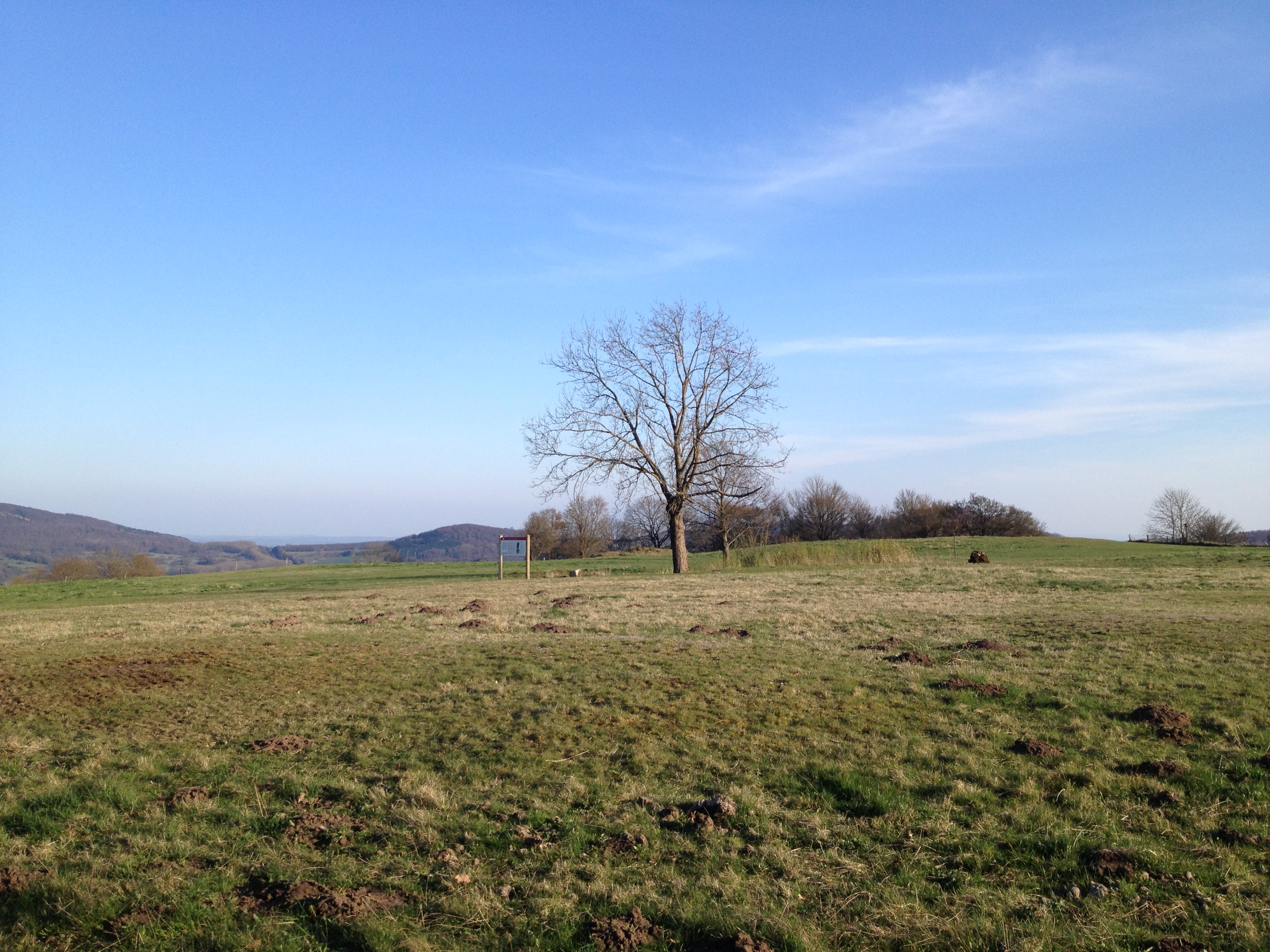 Das Gipfelplateau des Hasunger Bergs, in der Mitte der Teich.